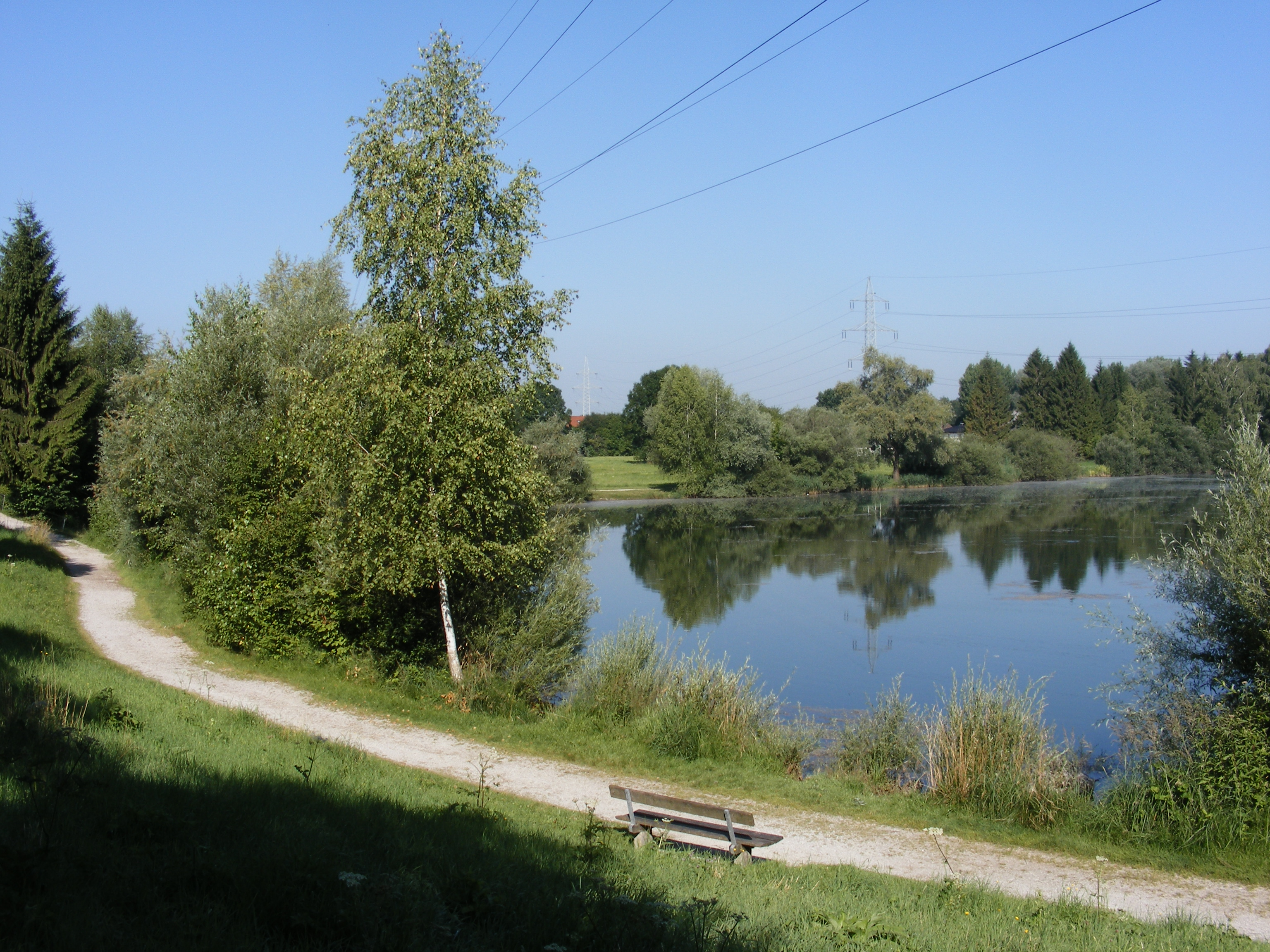 Der Salzachsee im Salzburger Stadtteil Liefering im Norden der Stadt